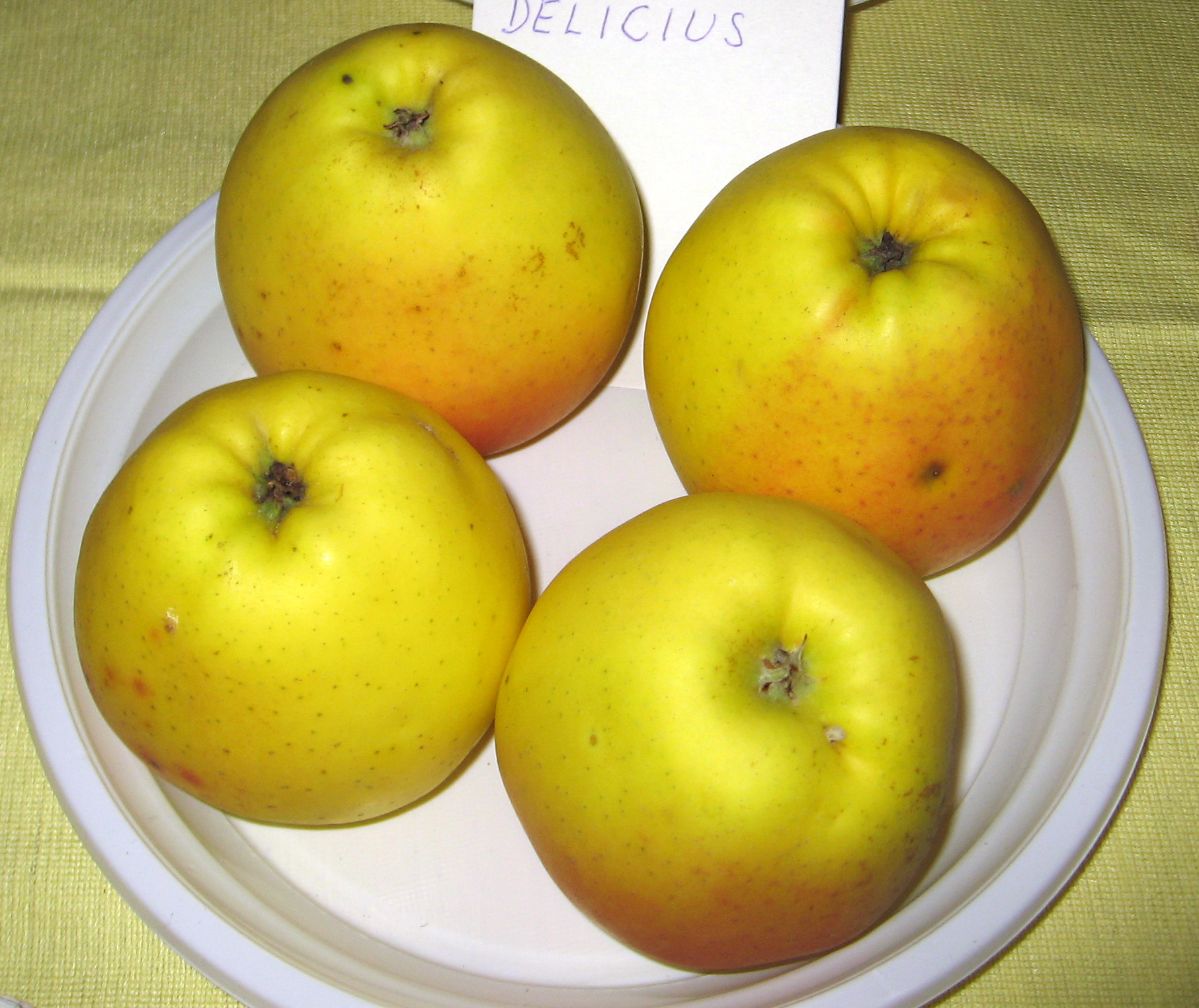 odrůda Zlatý (Golden) Delicius